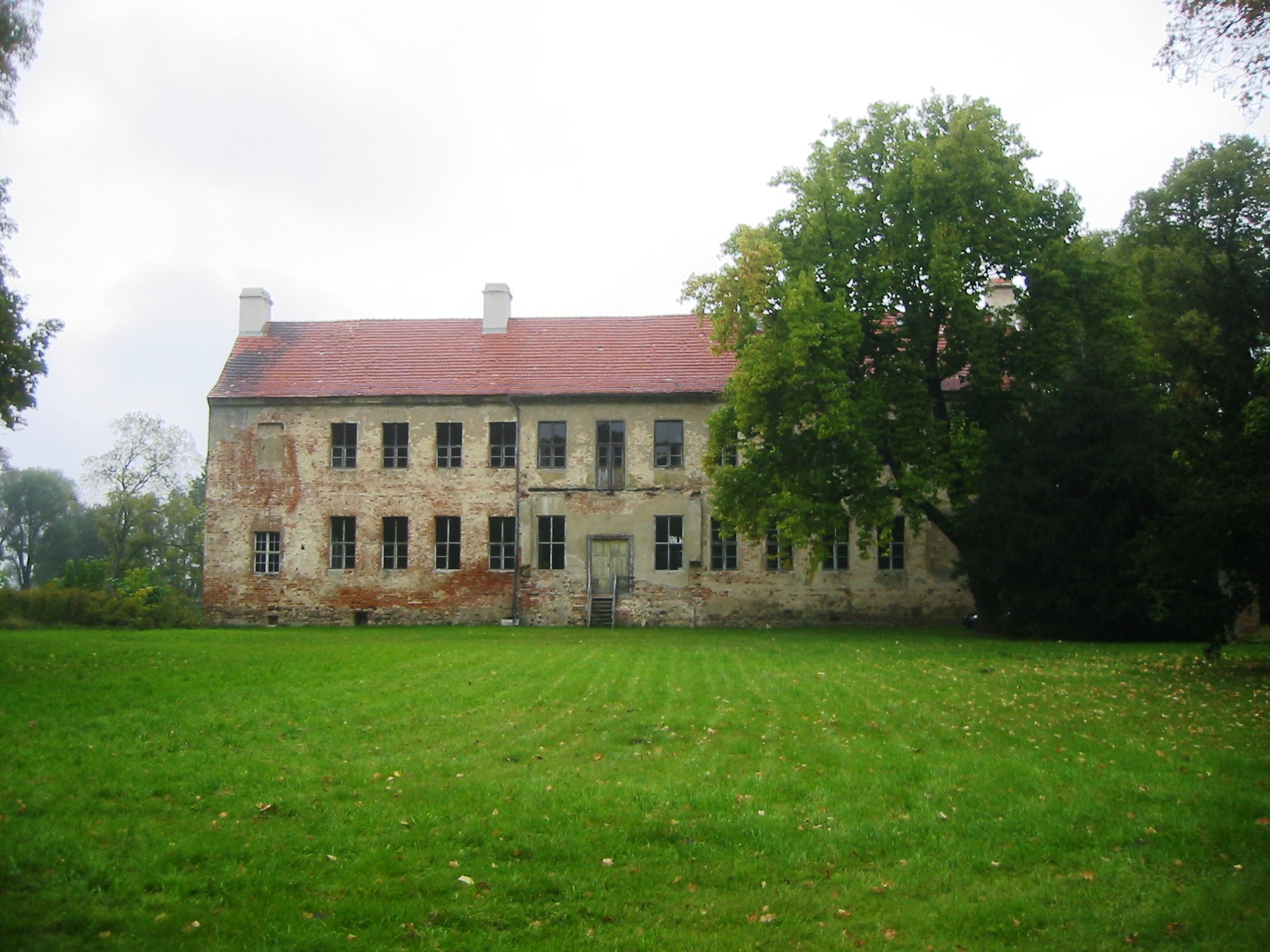 Denkmalgeschütztes Herrenhaus aus dem 17. Jahrhundert in Münchehofe, Landkreis Dahme-Spreewald, Brandenburg